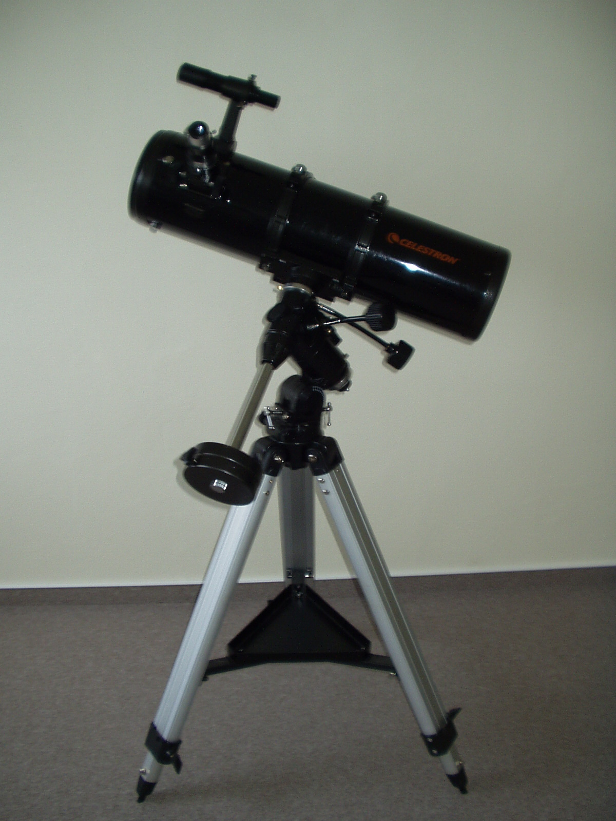 Newton 150/750 Celestron na paralaktickej montáži.